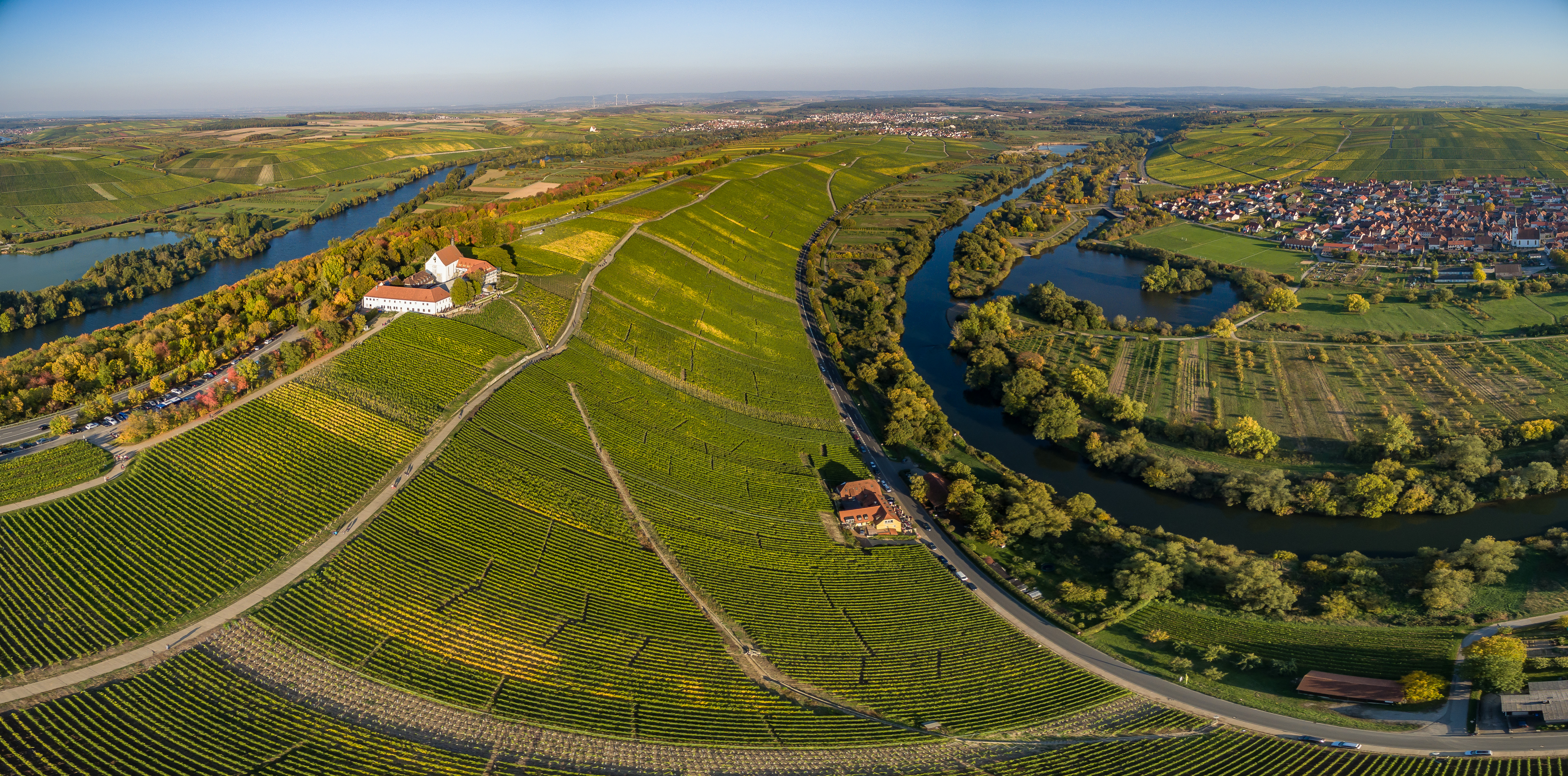 Vogelsburg bei Volkach und Mainschleife aus Richtung Escherndorf